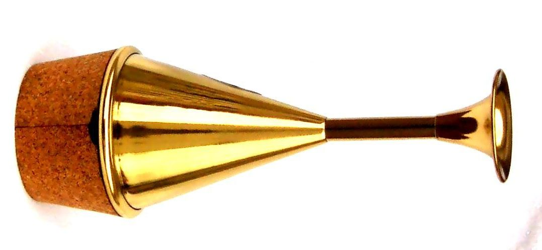 Waldhornstopfer querliegend